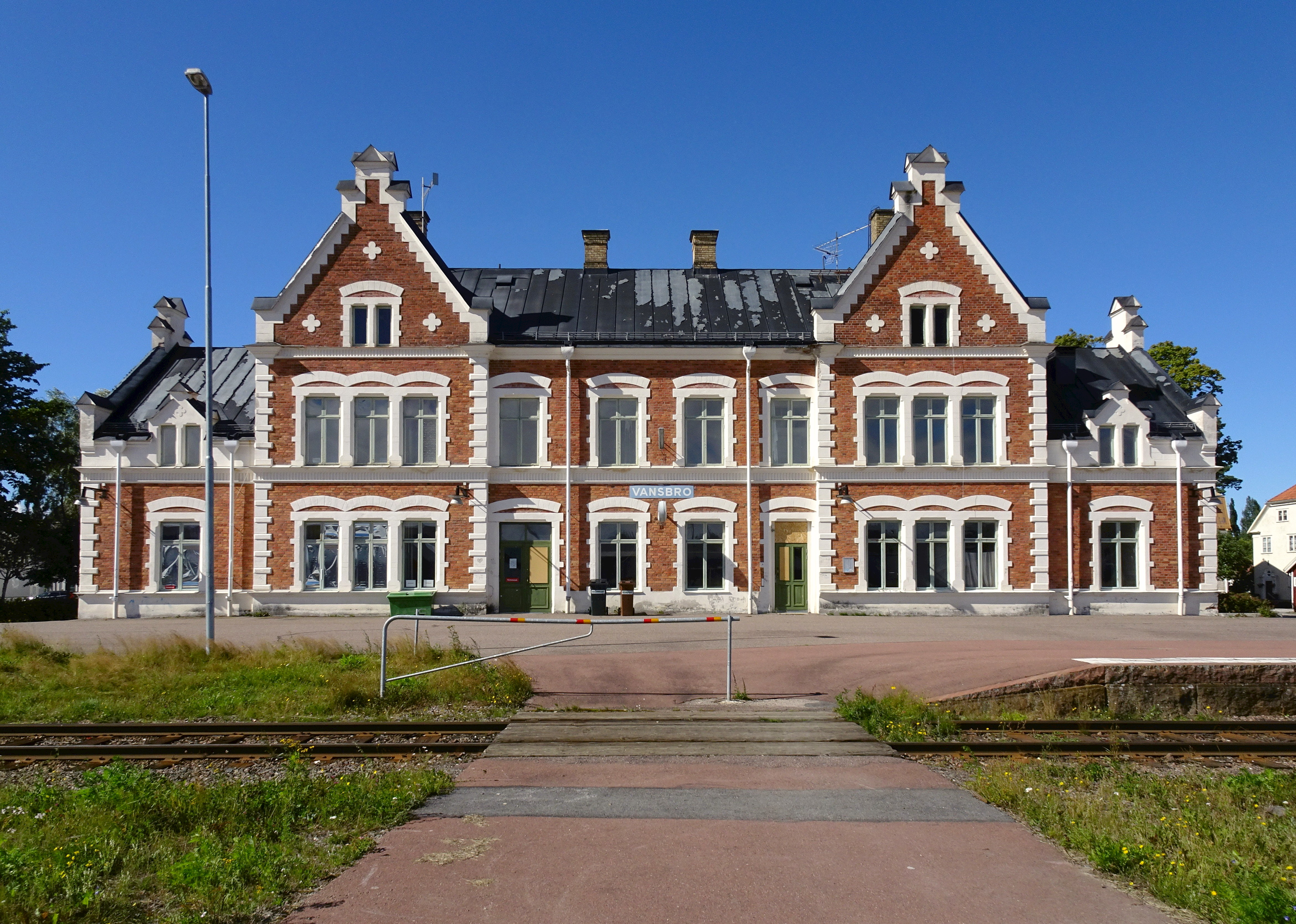 Vansbro stationshus. Vansbro järnvägsstation på Inlandsbanan byggdes 1899 och arkitekt var Erik Lallerstedt.